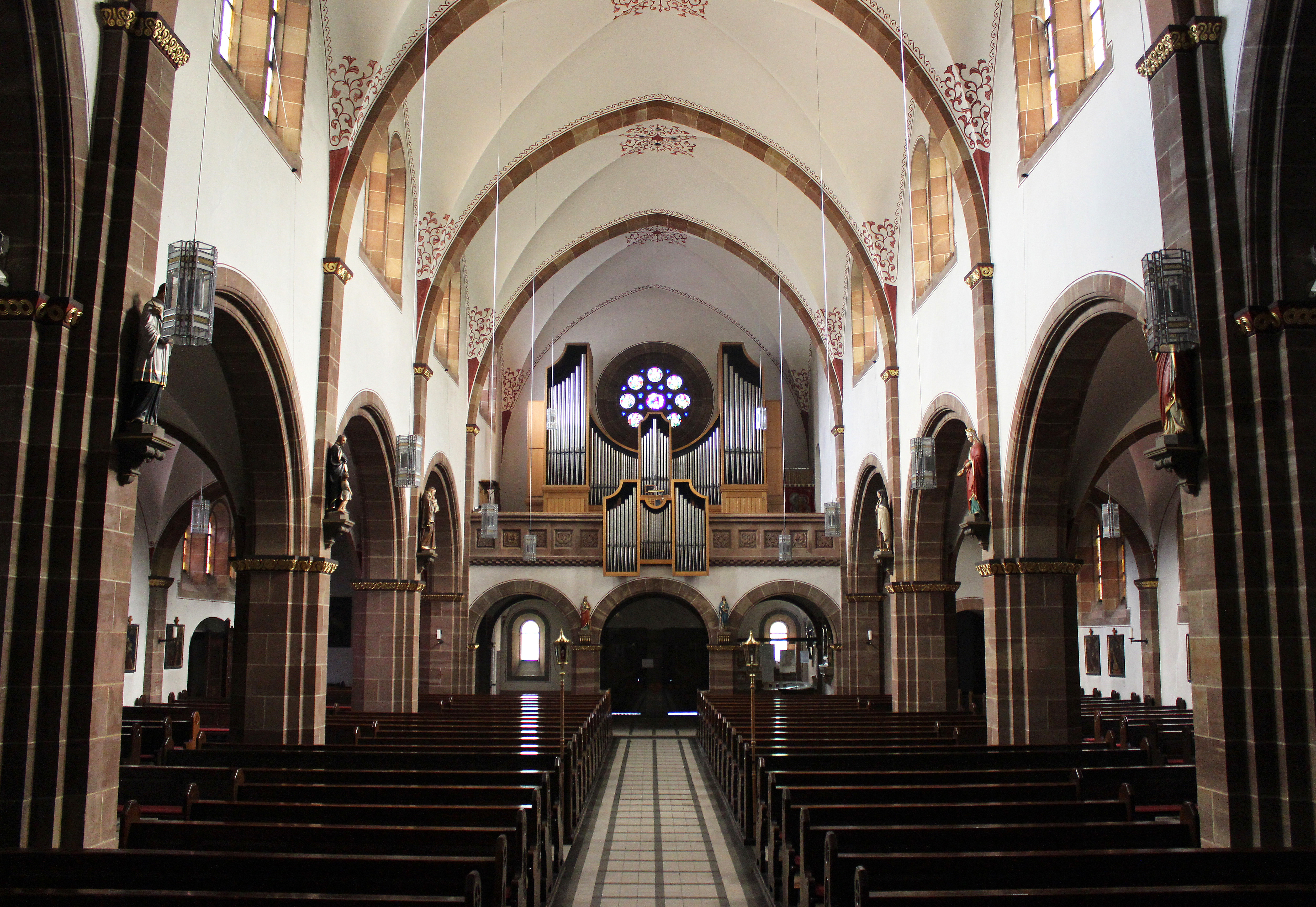 Blick ins Innere der katholischen Pfarrkirche St. Josef in Fischbach-Camphausen, Gemeinde Quierschied, Regionalverband Saarbrücken, Saarland